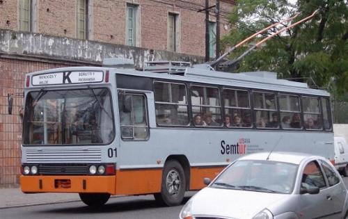 Unidad de Trolebús perteneciente a la Línea K de Rosario, Argentina